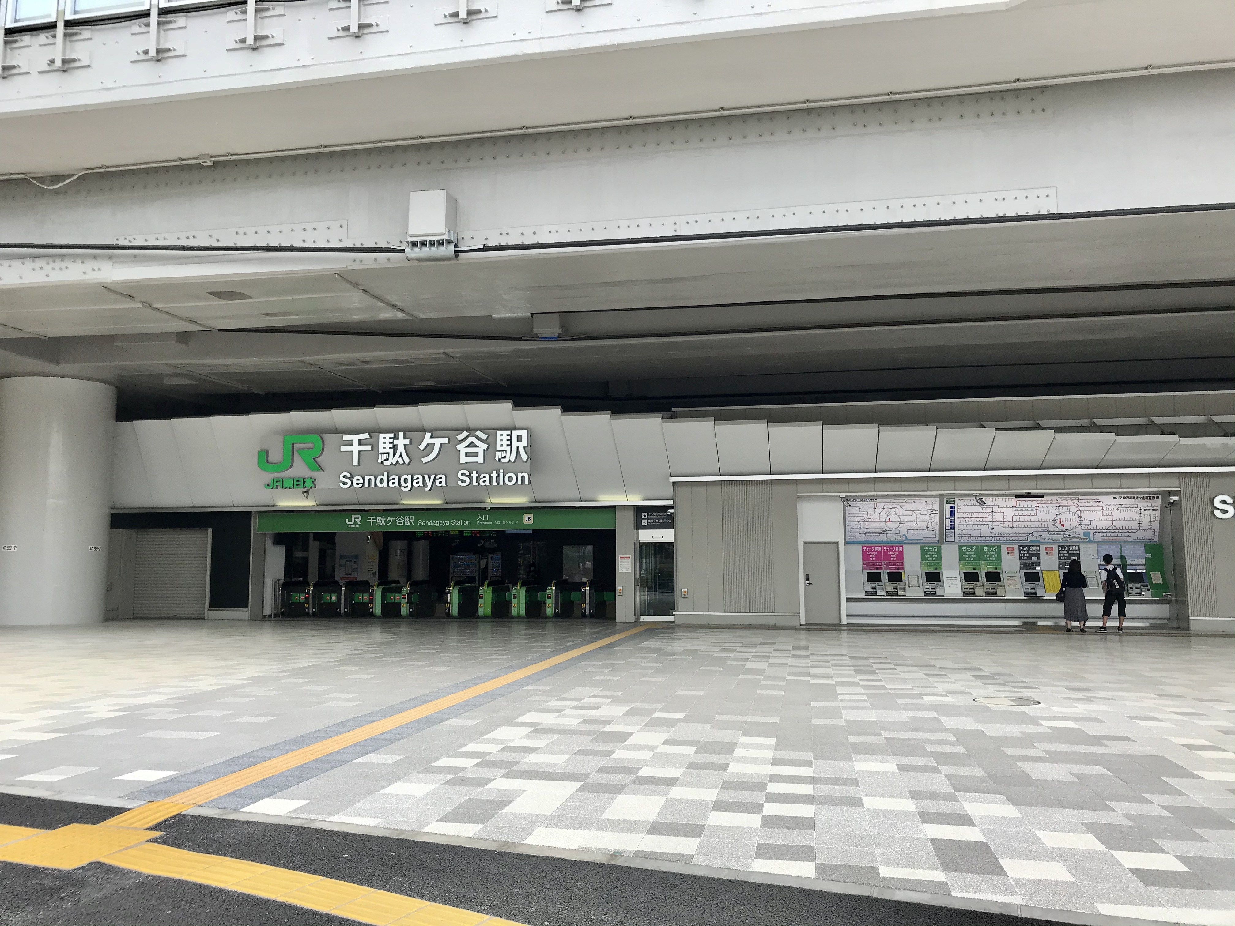 JR東日本中央・総武緩行線千駄ヶ谷駅駅舎